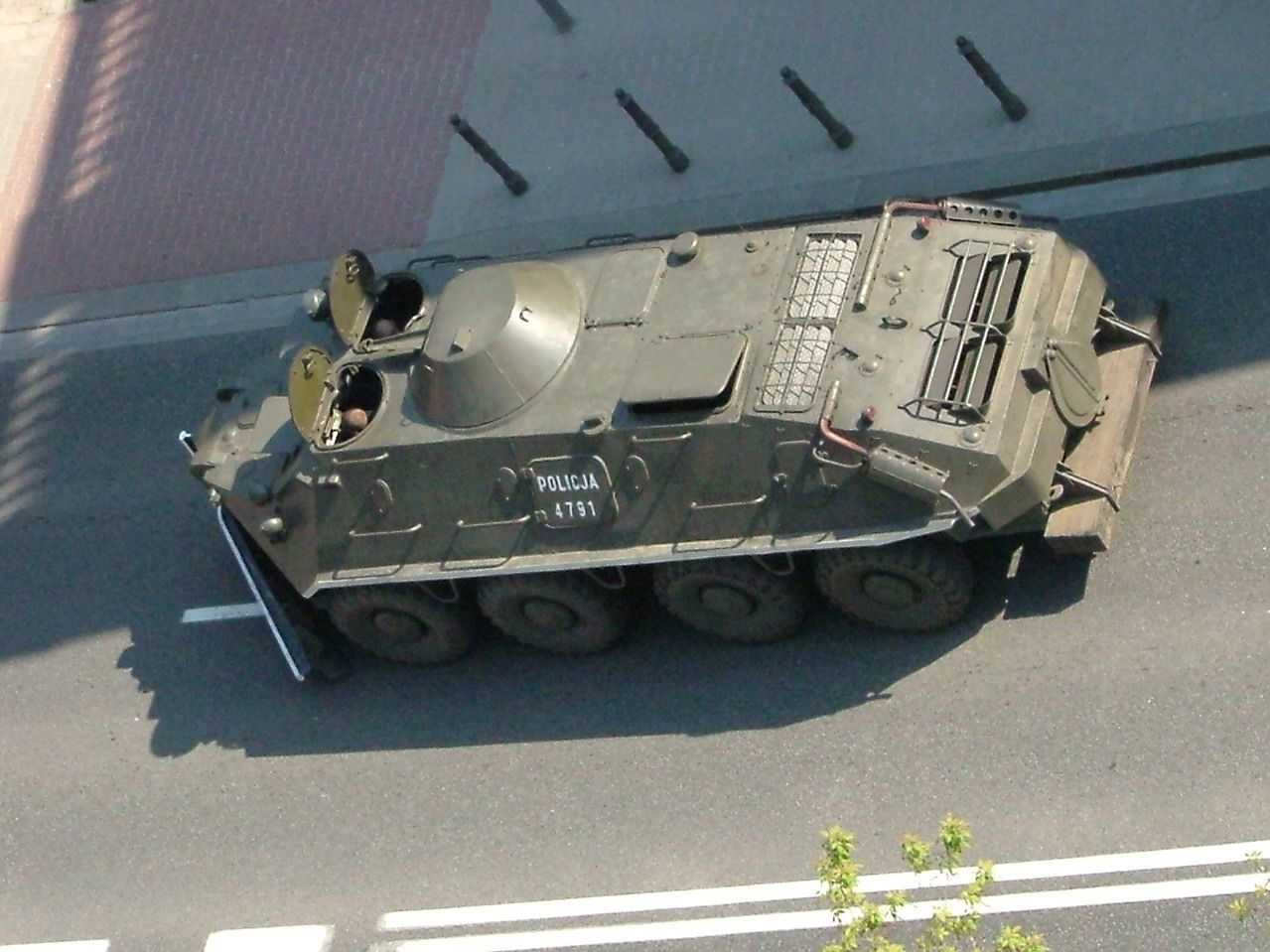 BTR-60PB APC of the Polish Police in Warsaw, Poland, Tamka Street, European Economy Summit 2004 (Europejski Szczyt Gospodarczy 2004)